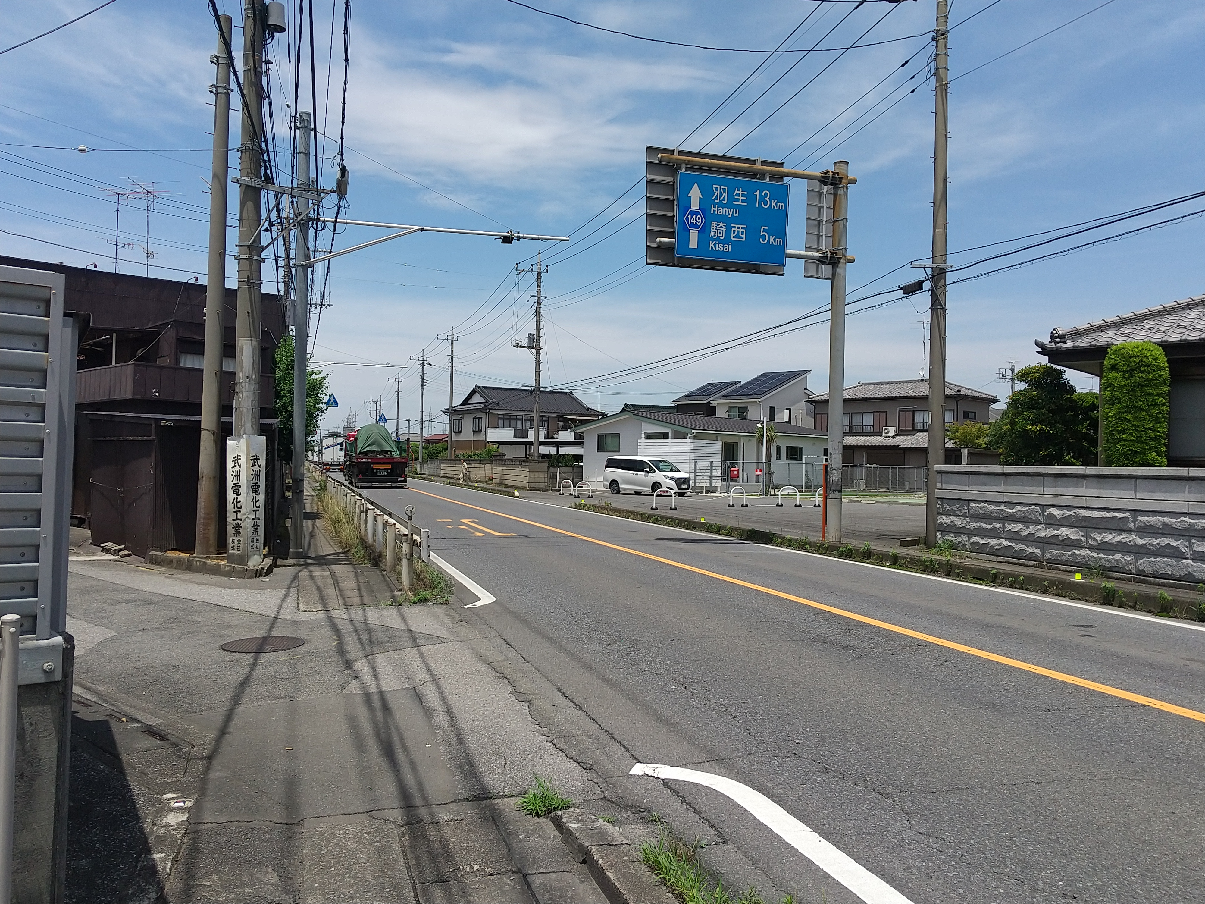 2020年6月撮影 菖蒲町菖蒲にて